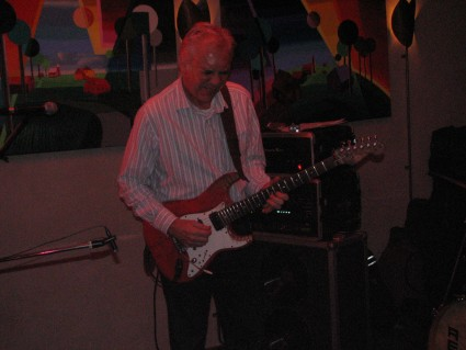 Eef Albers in café ´t Nonnetje Amersfoort